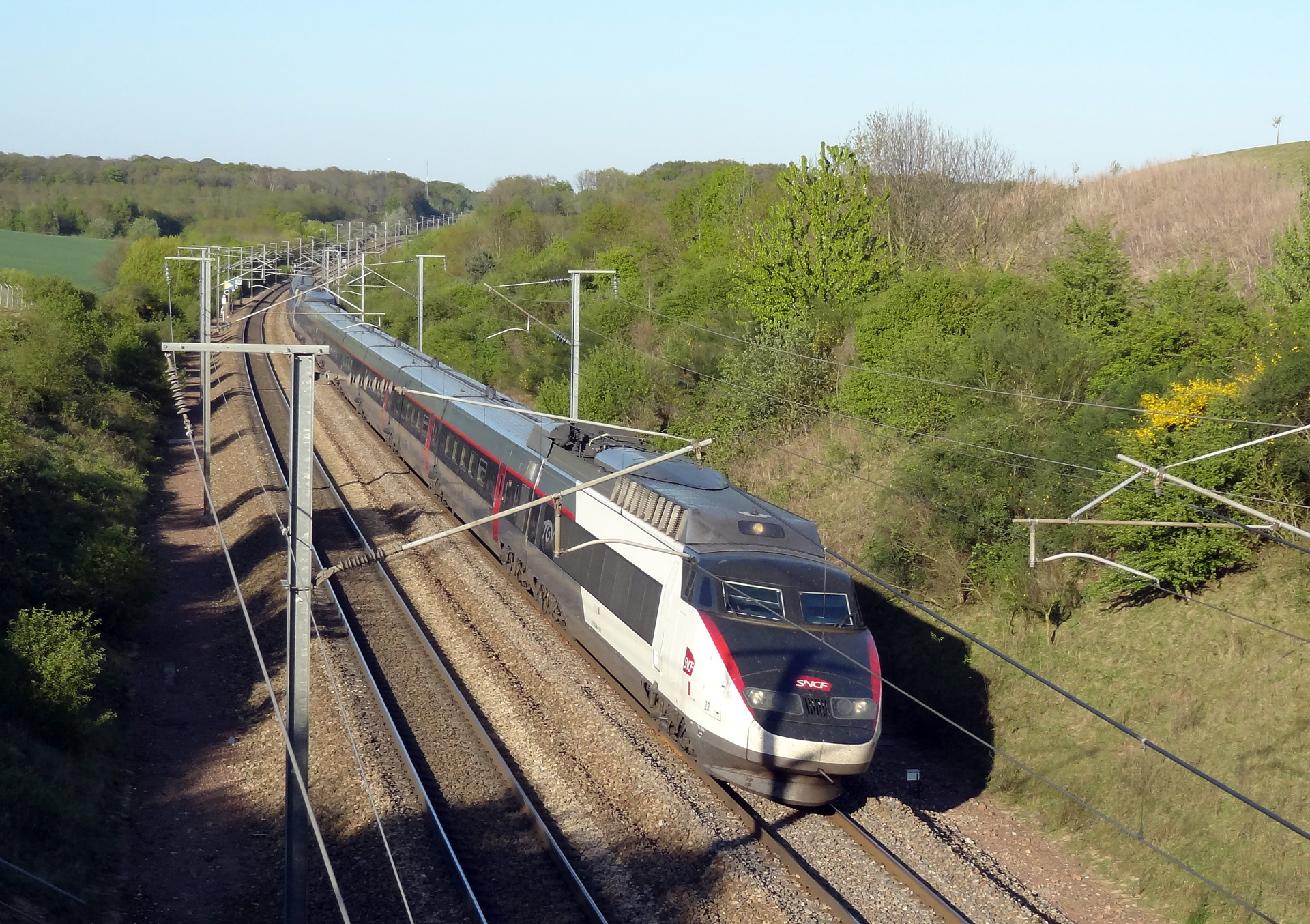 Une rame TGV Sud-Est en livrée Carmillon se dirige vers Paris-Nord sur la LGV Nord, à Moussy-le-Neuf (Seine-et-Marne), France.